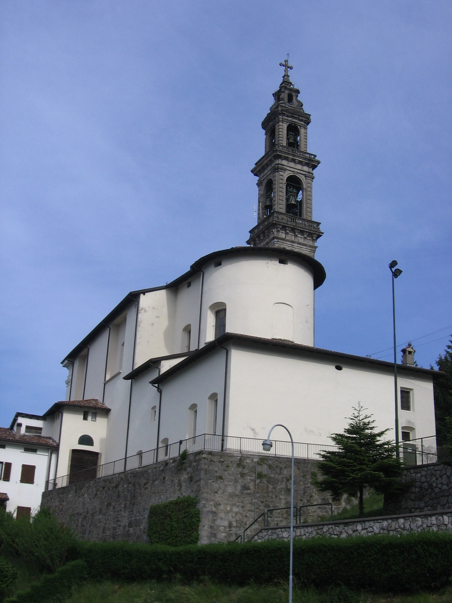 Costa Serina, Bergamo, Italia